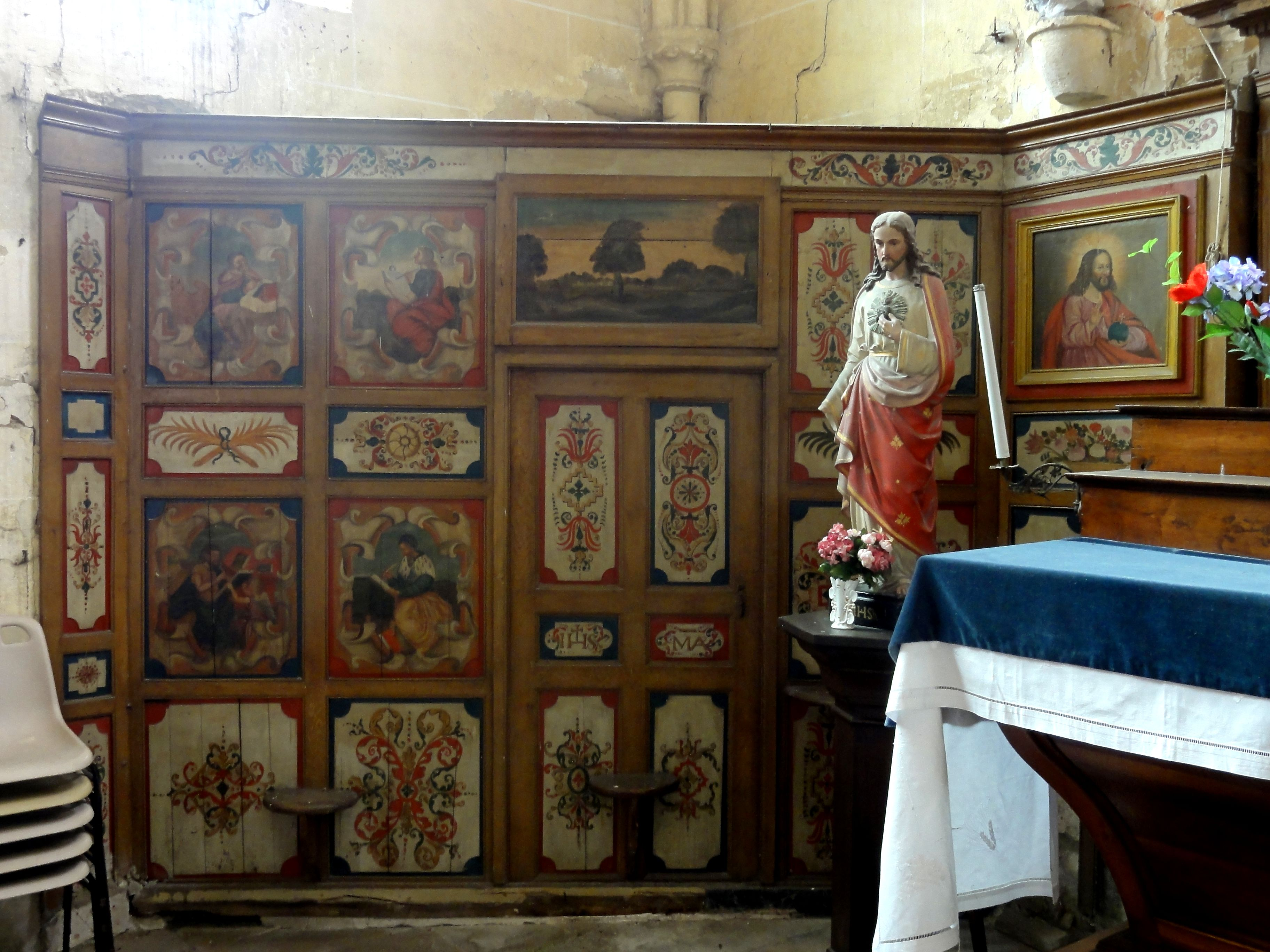 Retable du chevet, côté gauche.